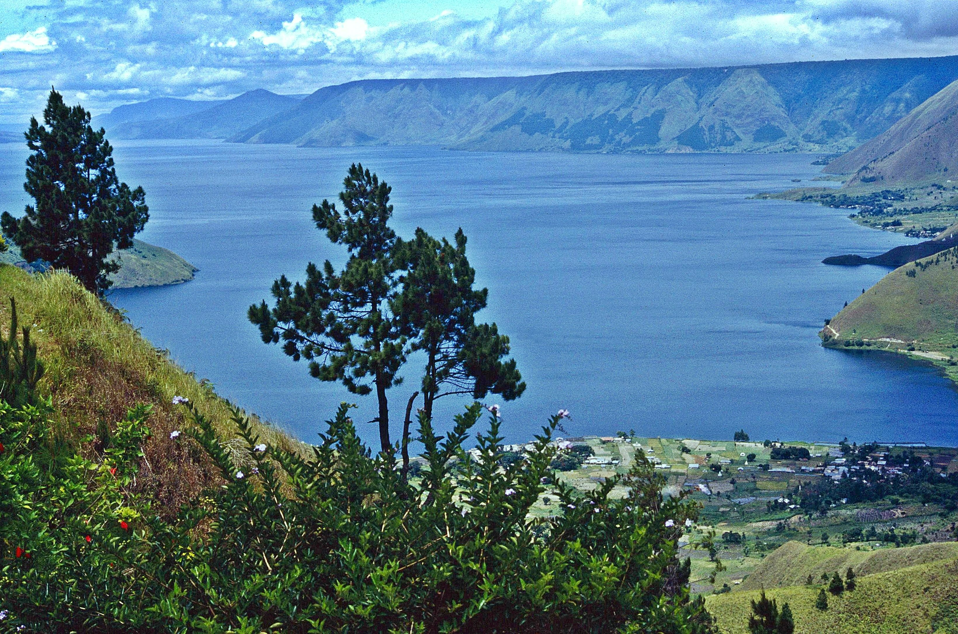 Toba-See auf der Insel Sumatra